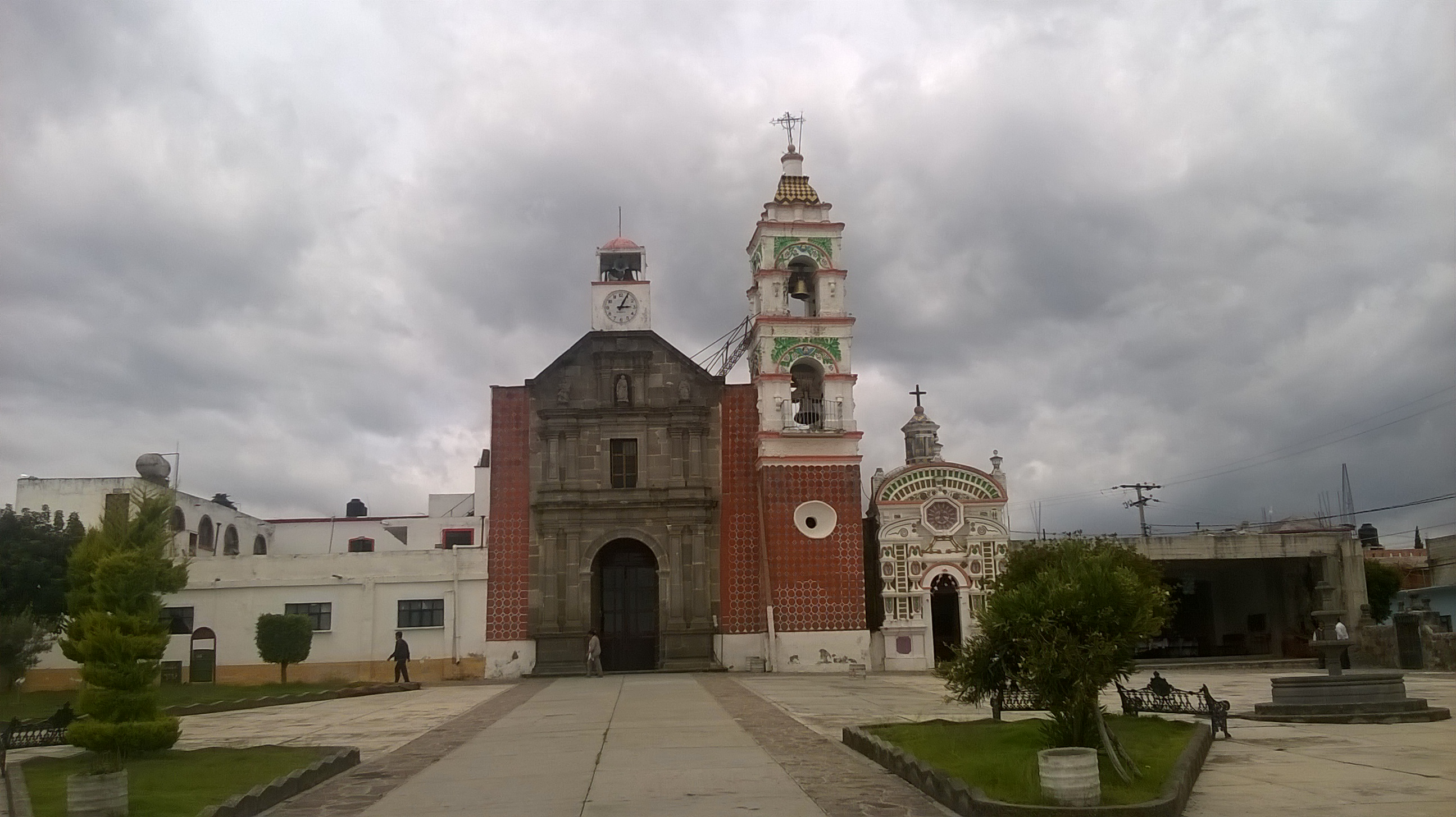 San Francisco Tetlanohcan, Tlaxcala